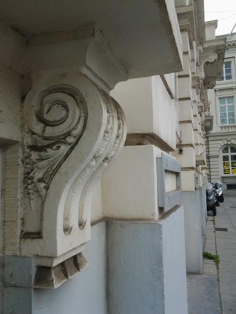 Corbeau à motif de gouttes et rudentures vu de profil